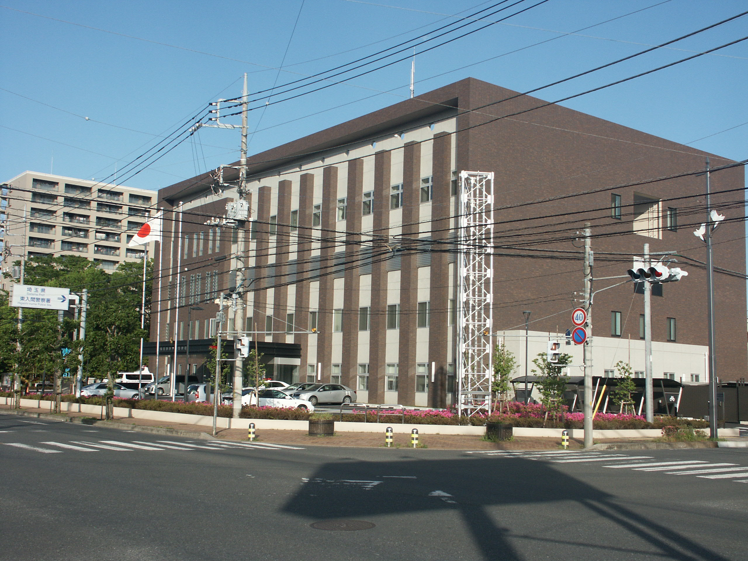 東入間警察署庁舎（庁舎角の交差点から撮影）